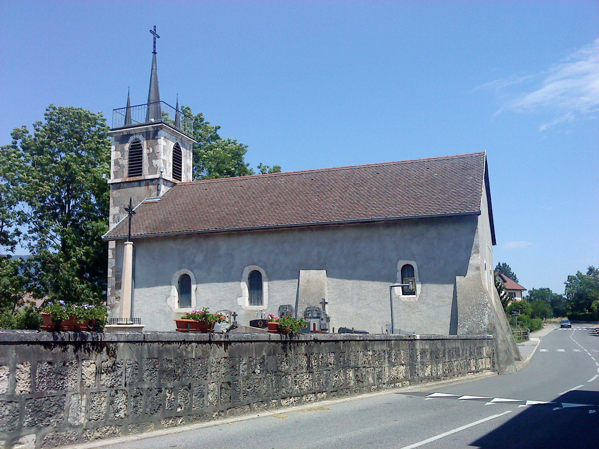 Eglise Saint-Martin de Versonnex, Ain, France